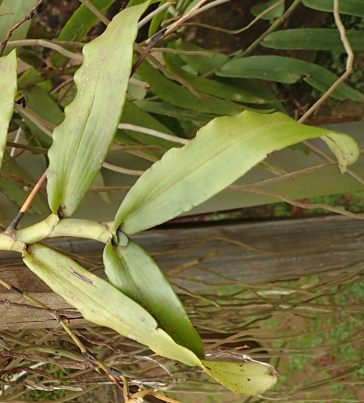 Feuilles distiques, nombreuses, charnues, plates, oblancéolées